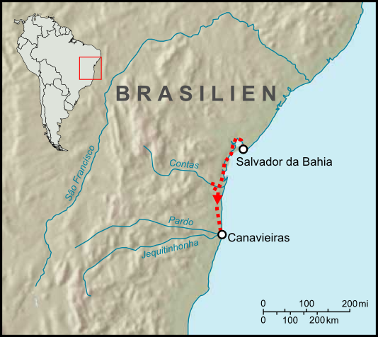 Route und Stationen der sechsten Forschungsreise des Percy Fawcett